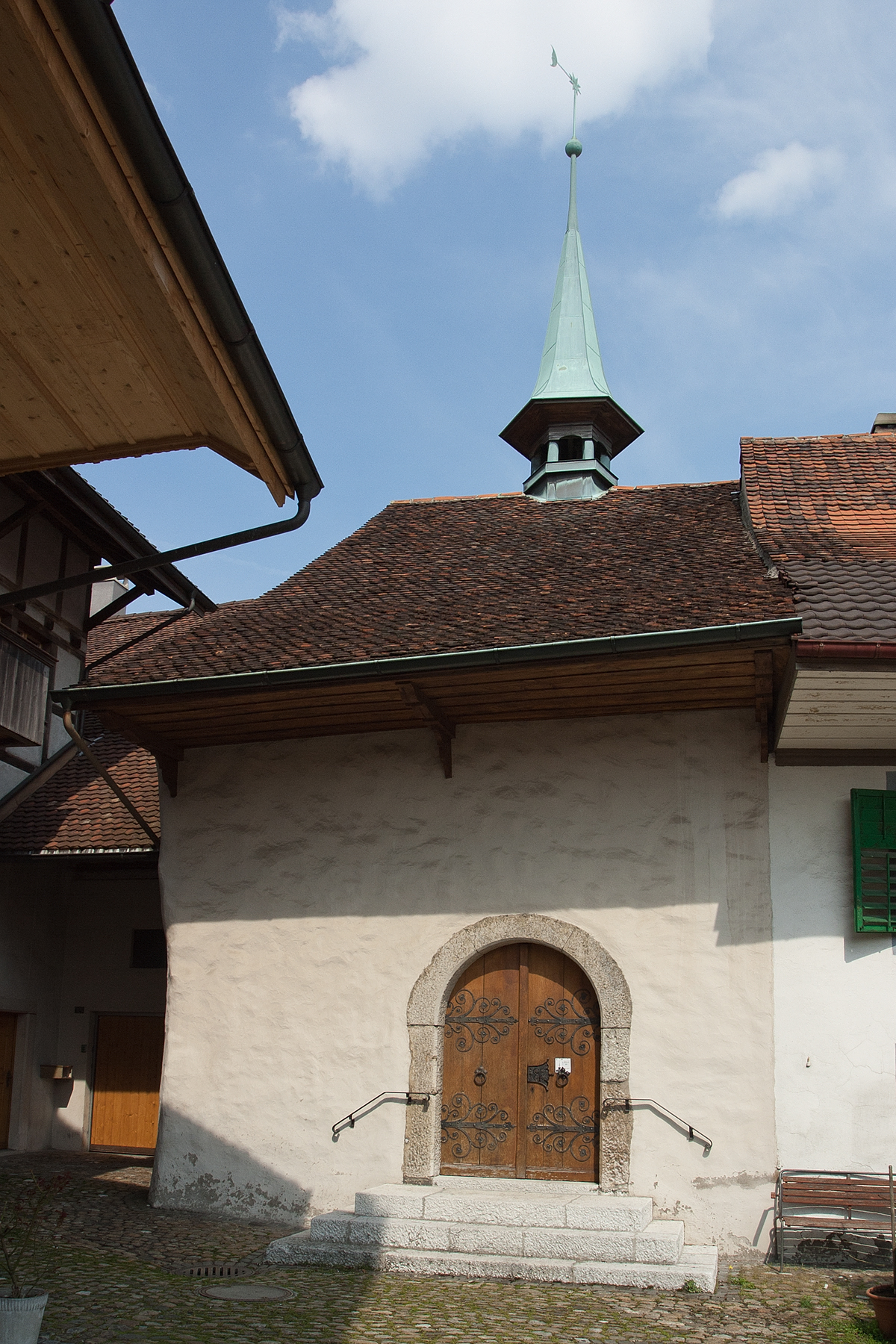 Reformierte Katharinenkapelle in Wiedlisbach (BE)